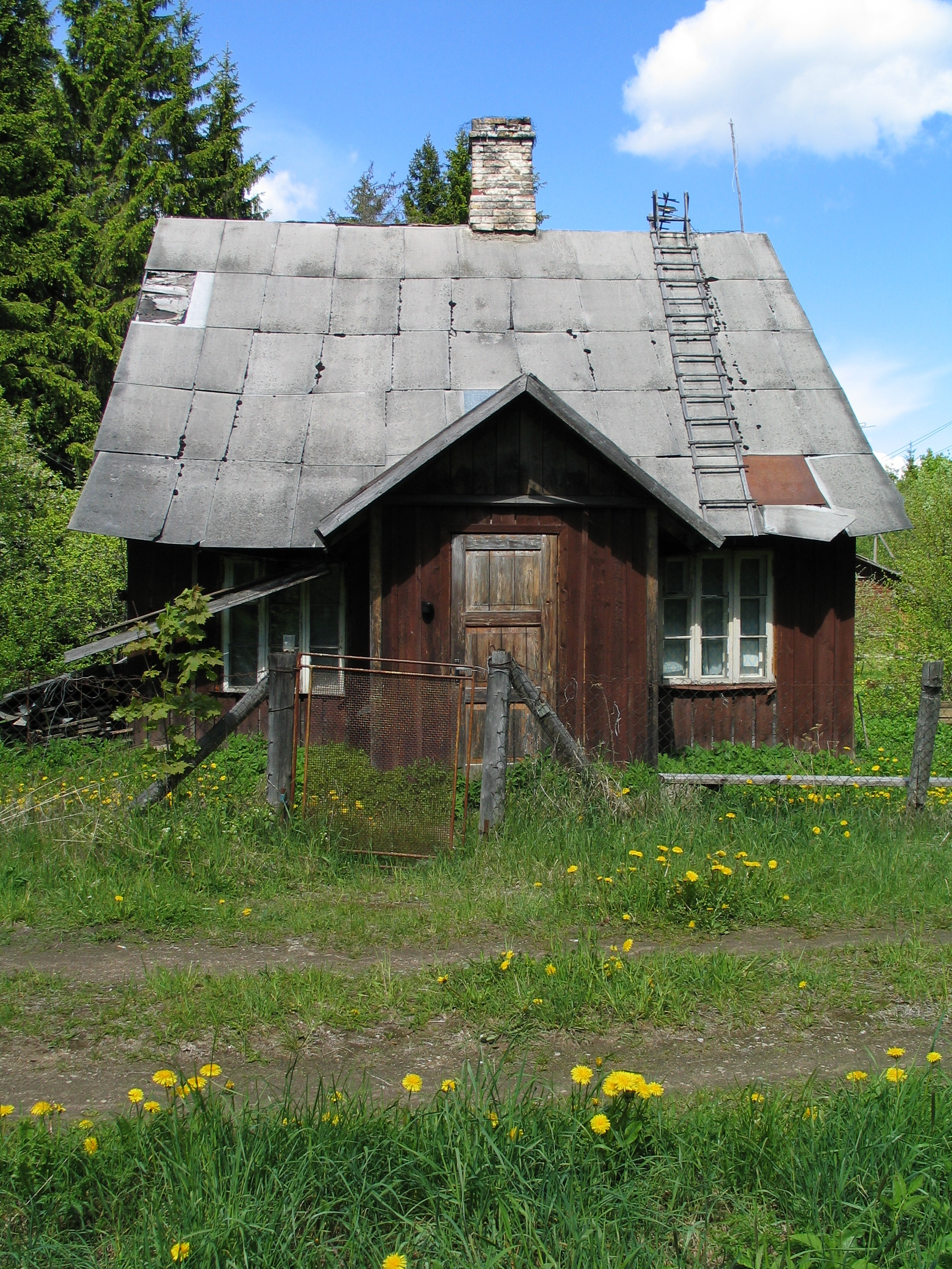 Võhmuta jaama raudteetööliste maja